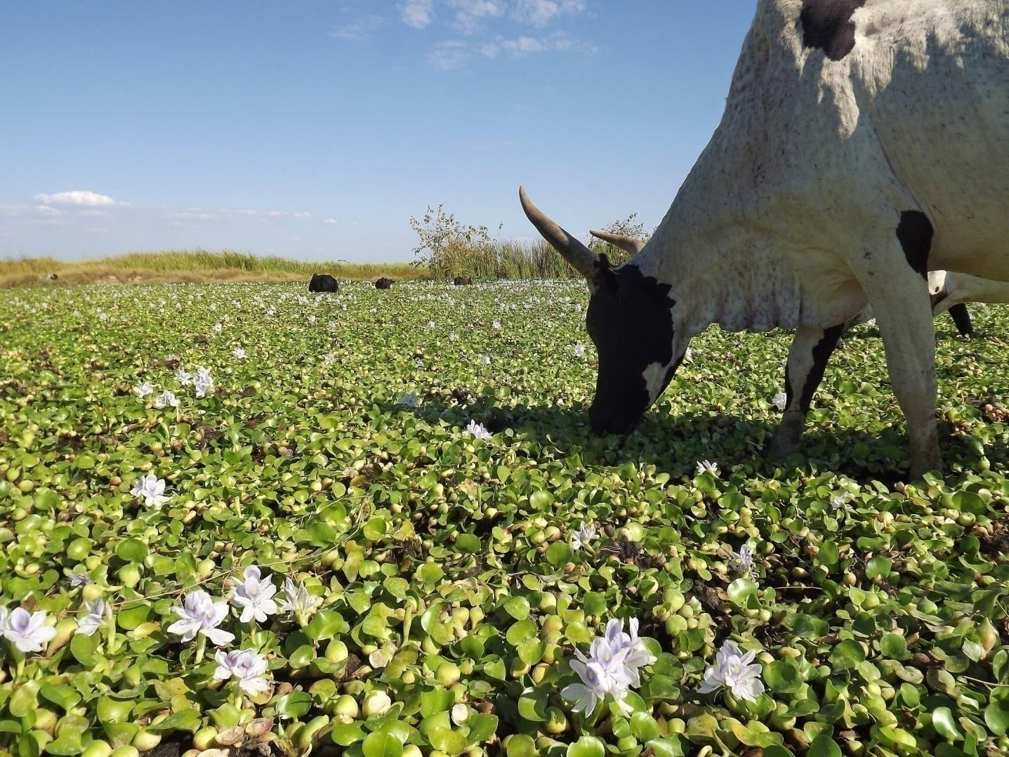 Zébu (Bos taurus indicus) dans un ranovory qui broute des jacinthes d'eau (Echornia crassipes)